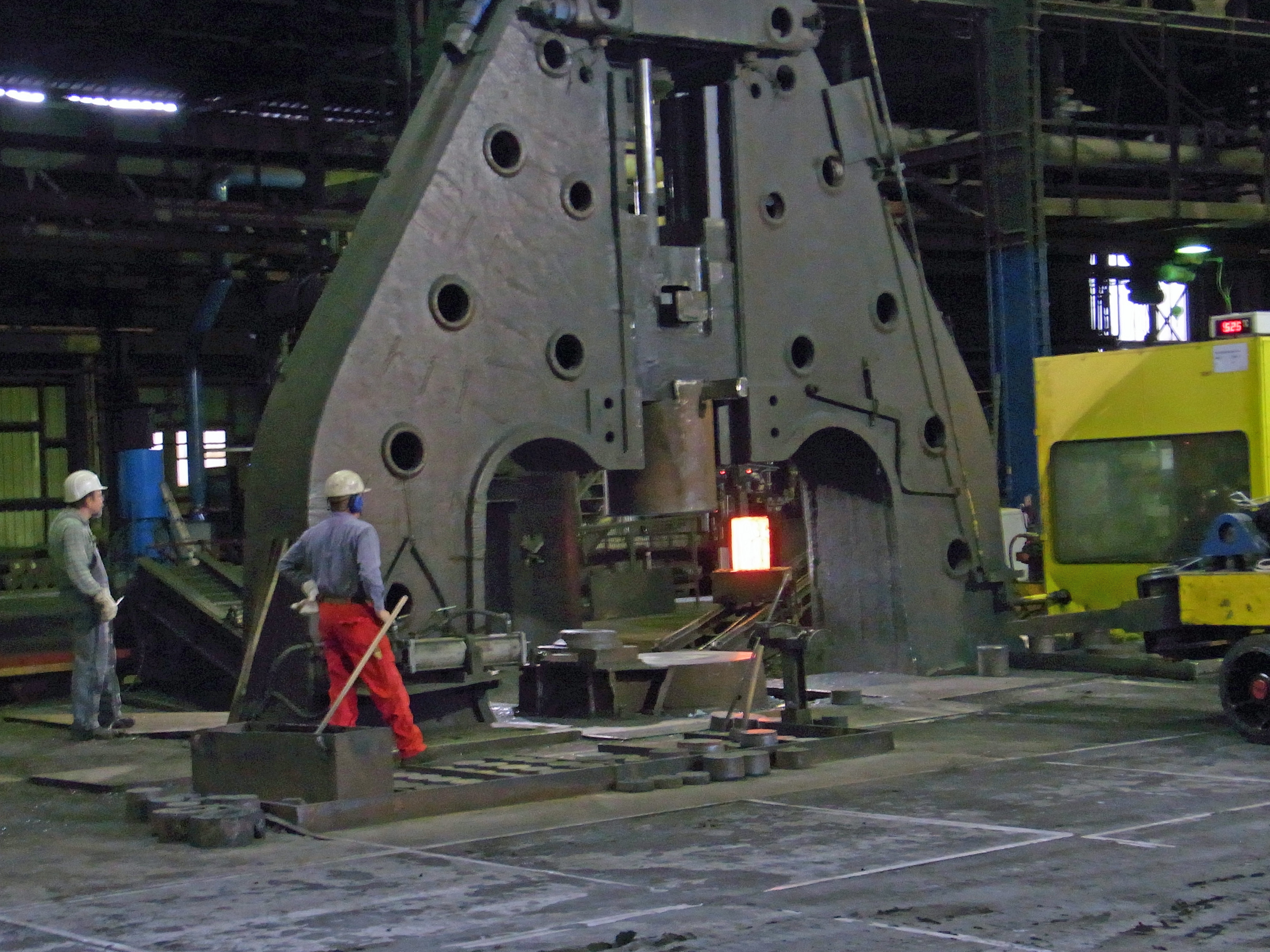 ExtraSchicht 2010 Radreifenproduktion im Bochumer Verein